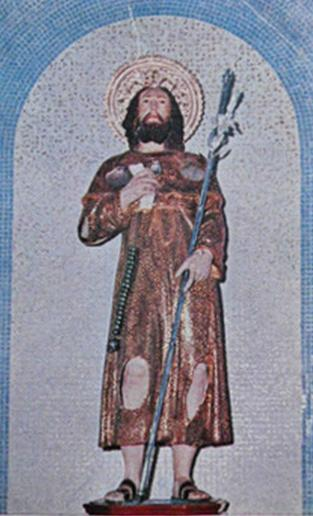 Statua di Sant'Alessio nella Chiesa di Sant'Alessio in Vico Sant'Alessio, Rione Lavinaio, Quartiere Pendino, a Napoli